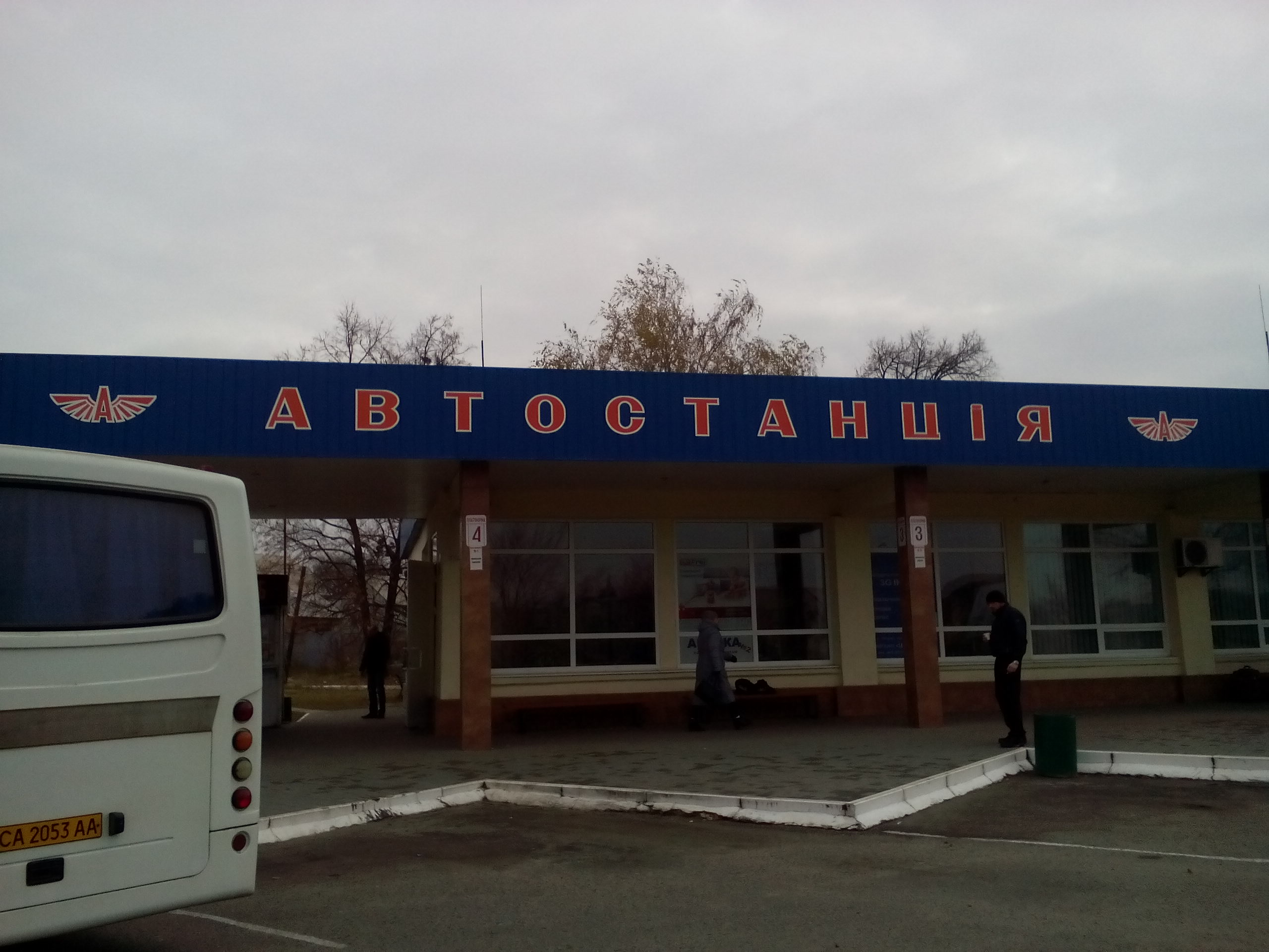 Автостанція у місті Чигирин Черкаської області